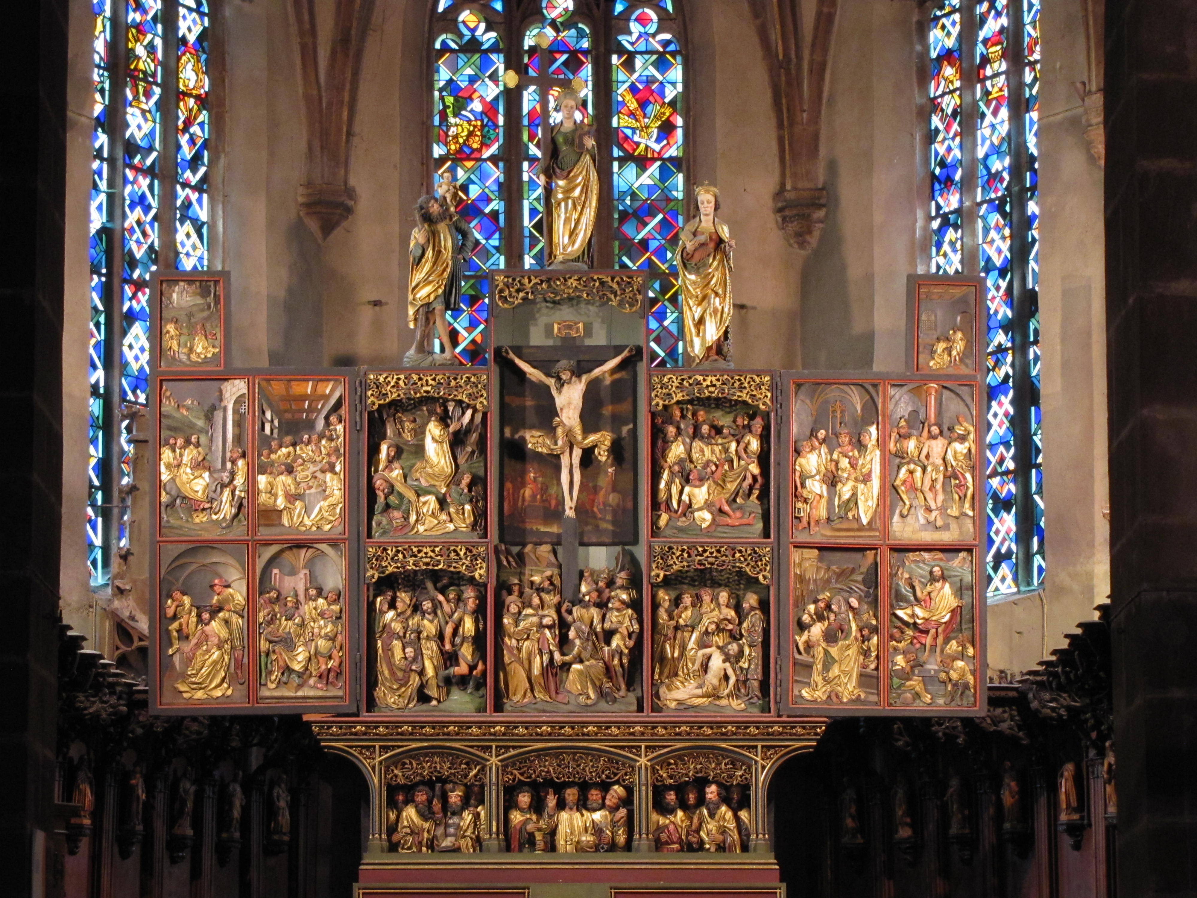 Alsace, Haut-Rhin, Église Sainte-Croix (XIIIe-XVe-XVIe) de Kaysersberg (PA00085477, IA68000563) Retable de la Passion (XVIe): This object is classé Monument Historique in the base Palissy, database of the French furniture patrimony of the French ministry of culture, under the references PM68000136, IM68006816 and IM68006817.